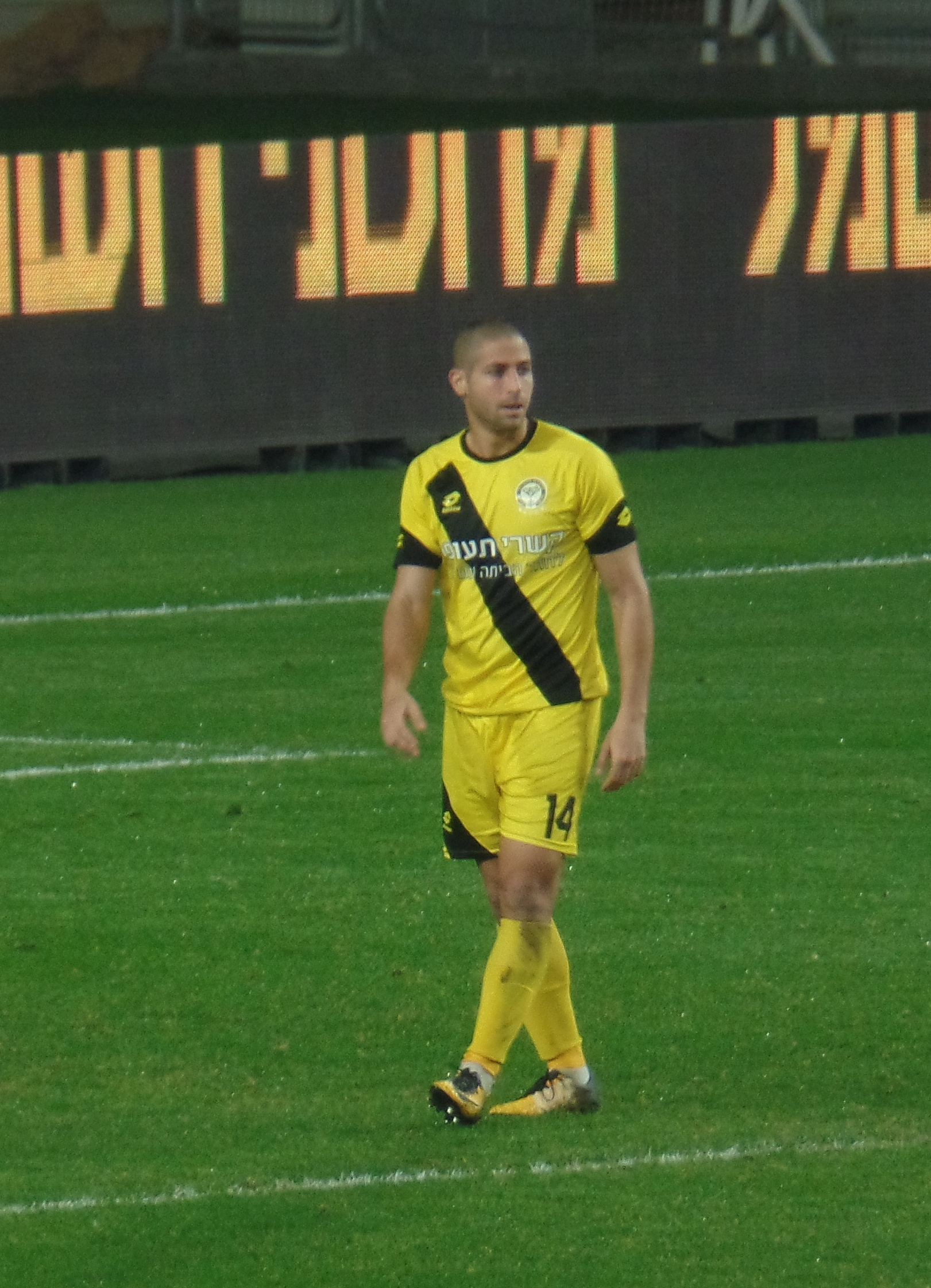 חגי גולדנברג במדי מכבי נתניה